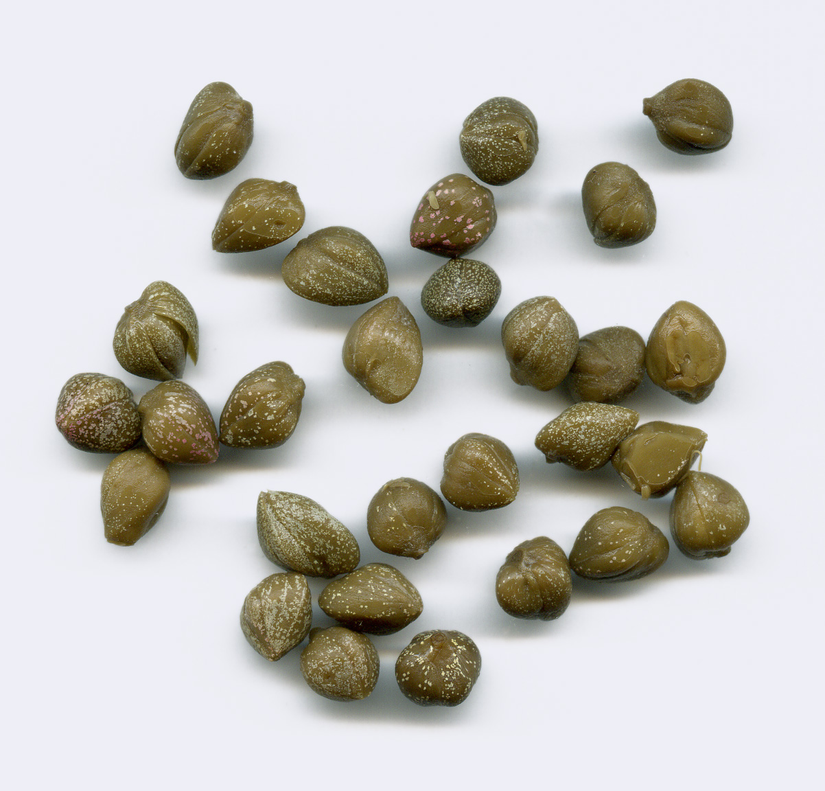 Eingelegte Kapern der Größe surfines. Eigenen Aufnahme, Public Domain